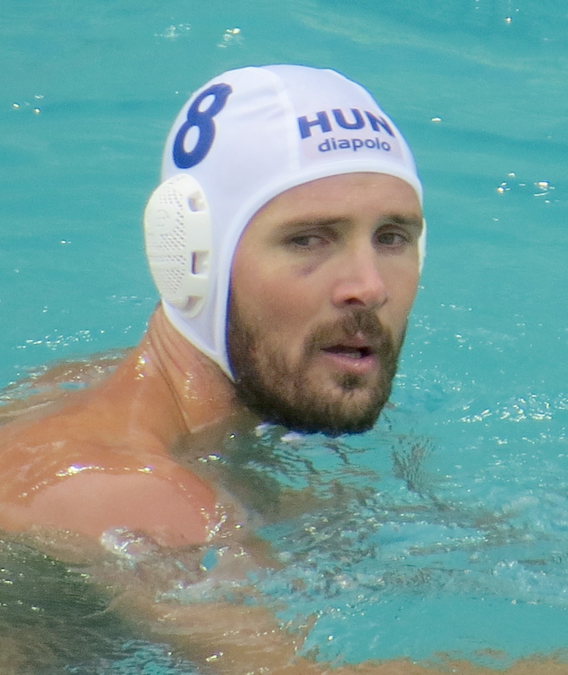 Rio 2016. Polo aquatico. sx50 89